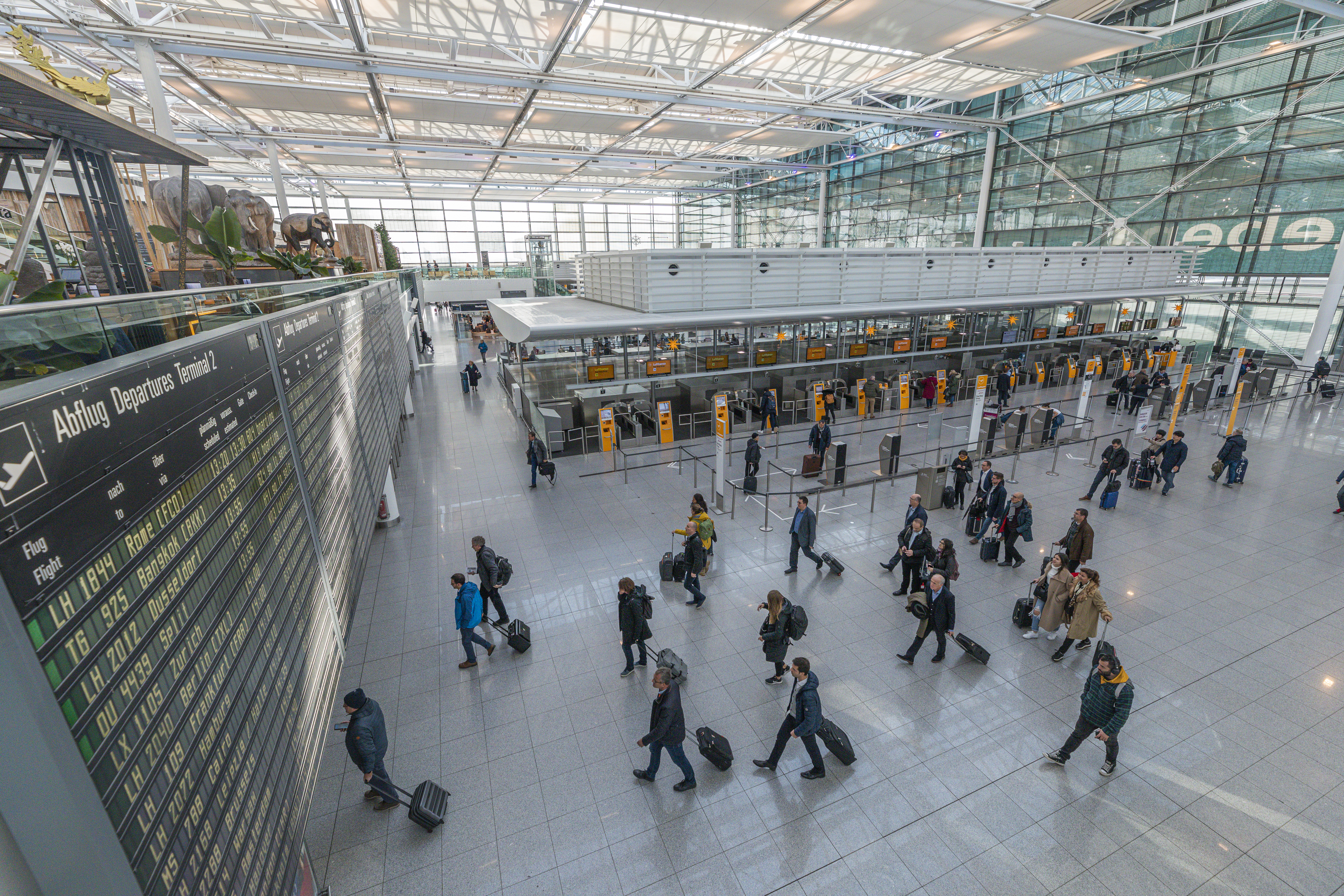 Flughafen München - Terminal 2